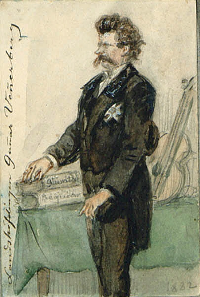 Gunnar Wennerberg (1817-1901). Akvarell och blyerts på papper. Mått 11,3 x 7,5 cm.